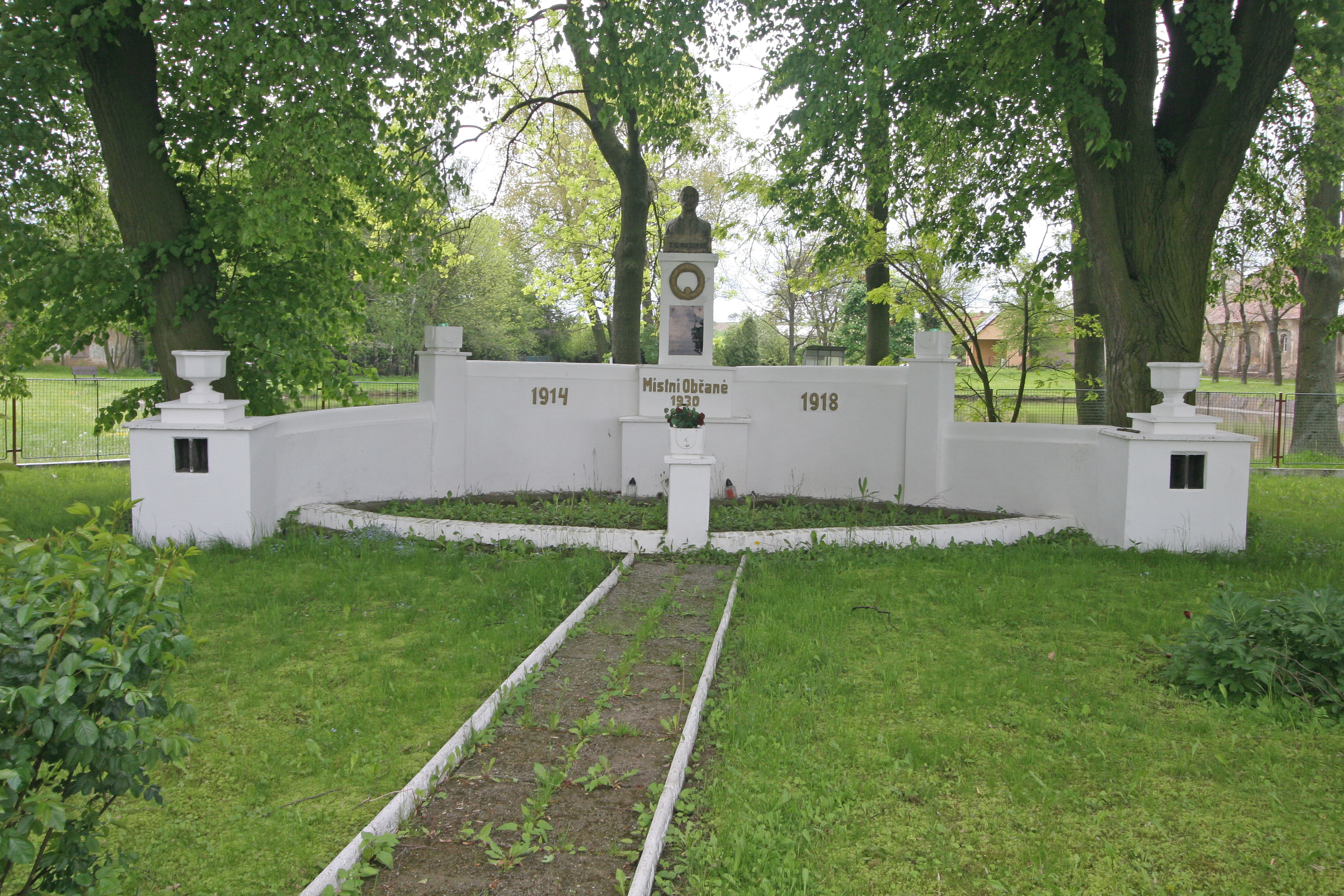 Libanice pomník padlých